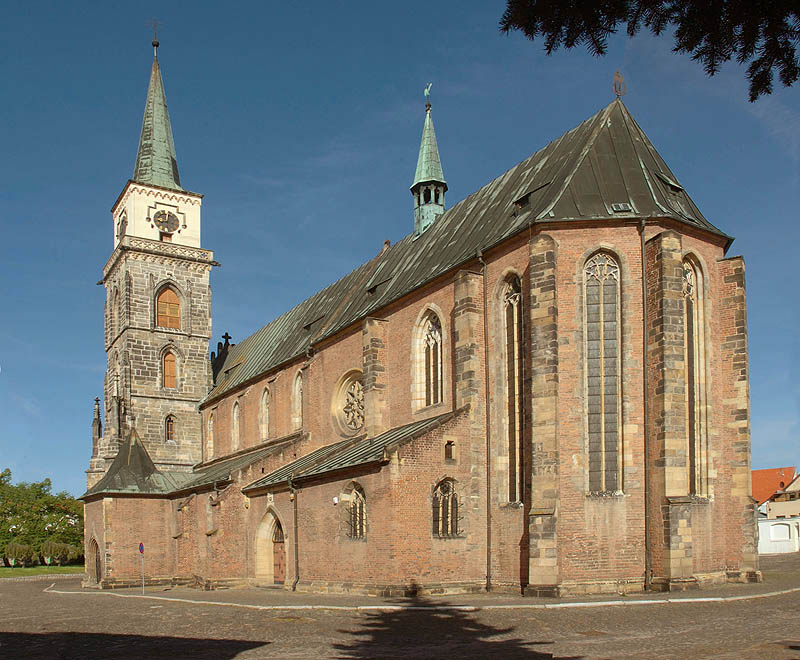 Kostel sv. Jiljí Nymburk